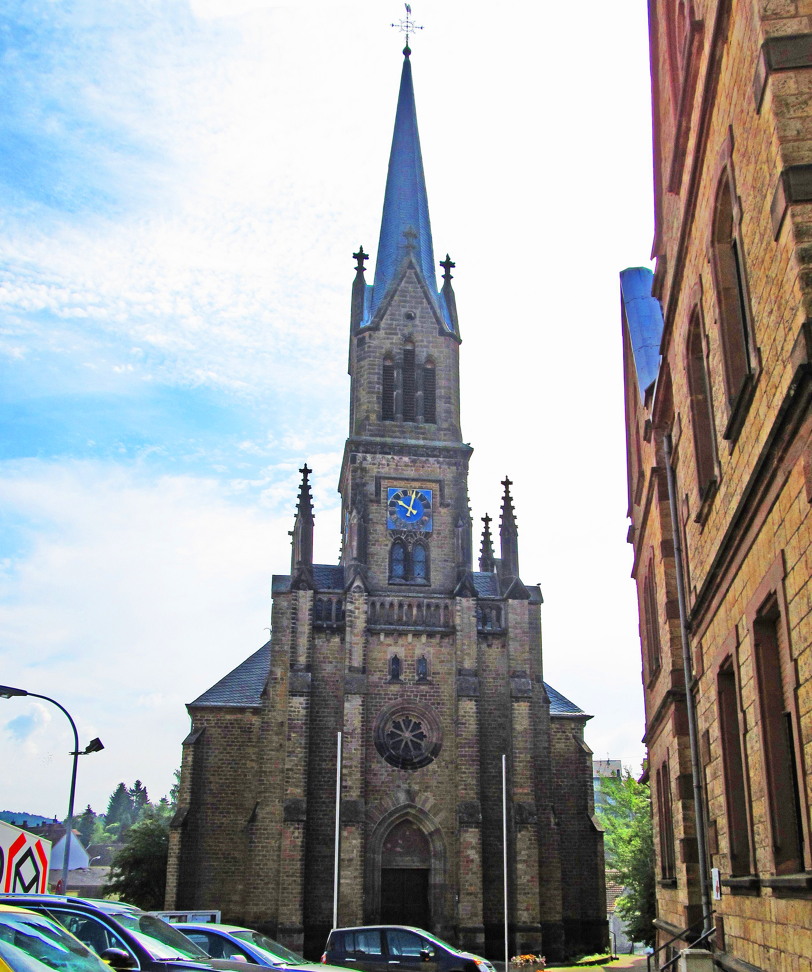 Die katholische Pfarrkirche St. Ludwig in Spiesen, Gemeinde Spiesen-Elversberg, Landkreis Neunkirchen, Saarland